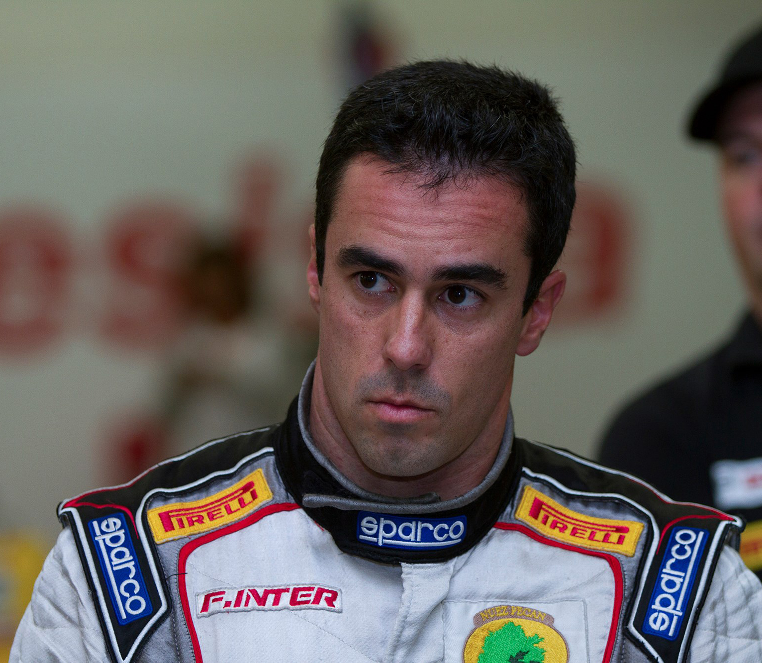 Marcelo Henriques no 4o. Round da Formula Inter na temporada 2017